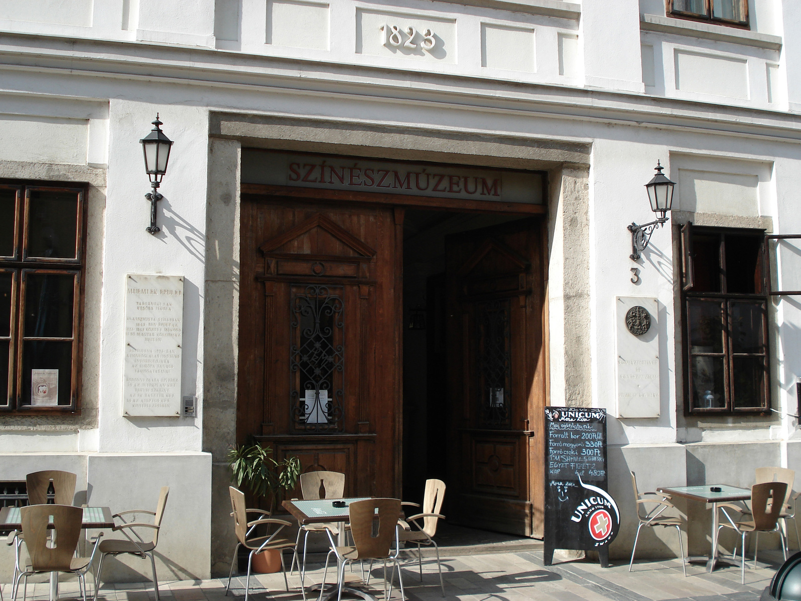 Lakóház, Iskola (Miskolc, Déryné u. 3 .) This is a photo of a monument in Hungary. Identifier: 2938